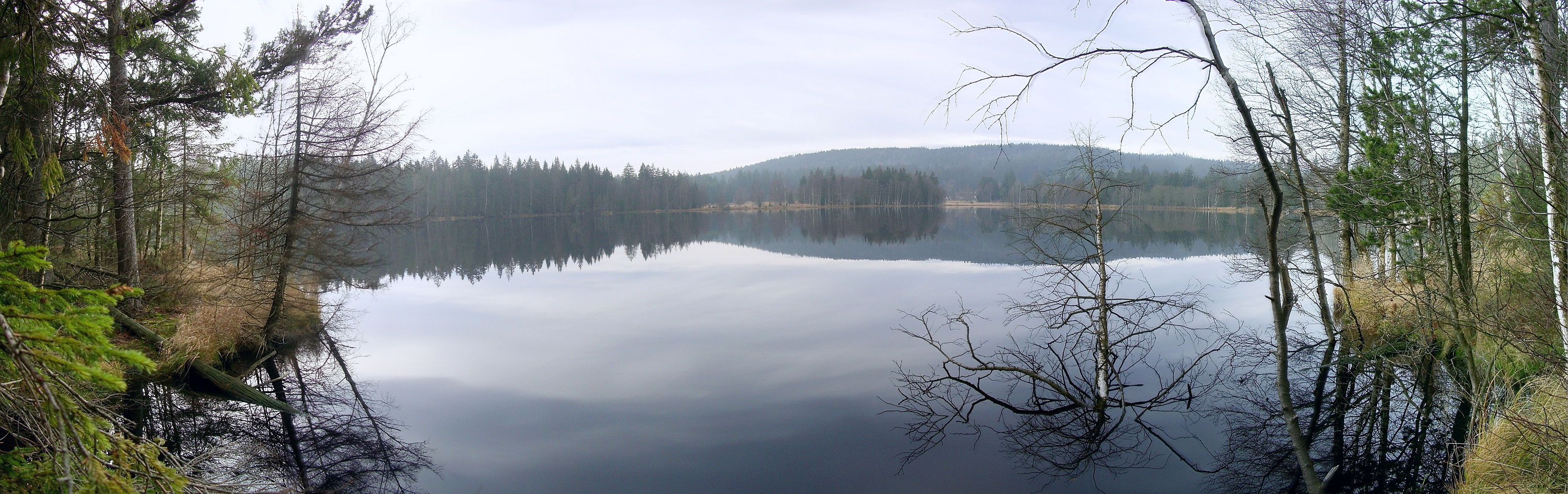 Kladský rybník u Kladské (na protější straně) ve Slavkovském lese.